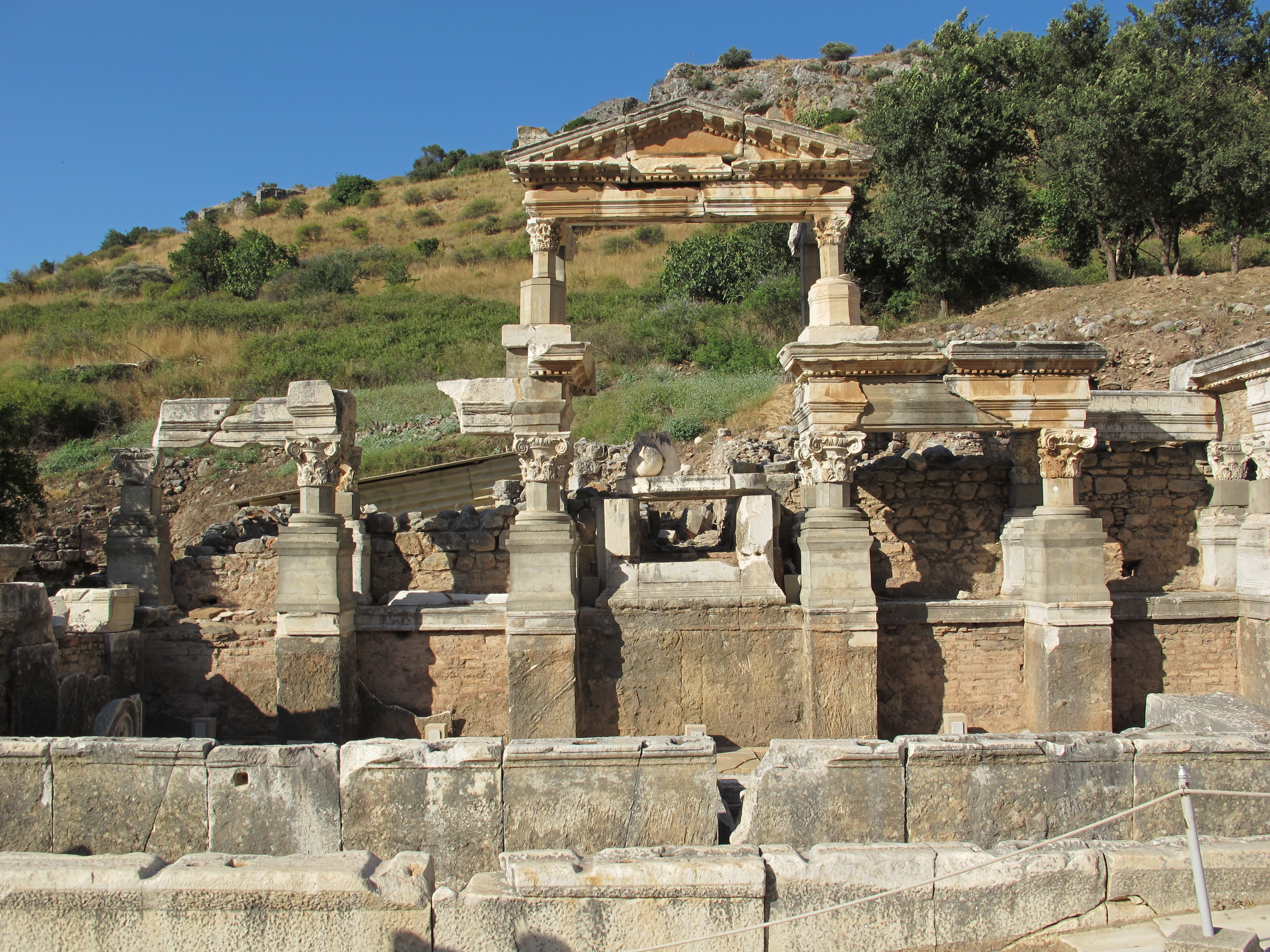 Efeso, ninfeo di traiano